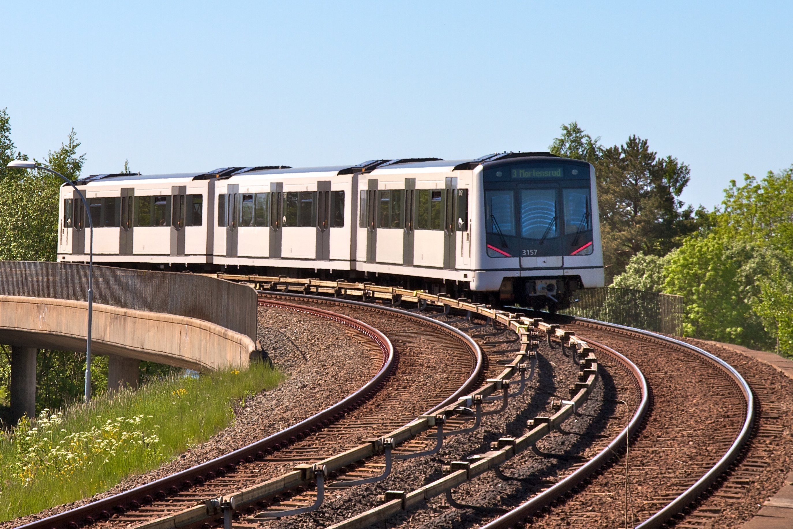 MX3000-tog nær Bøler.